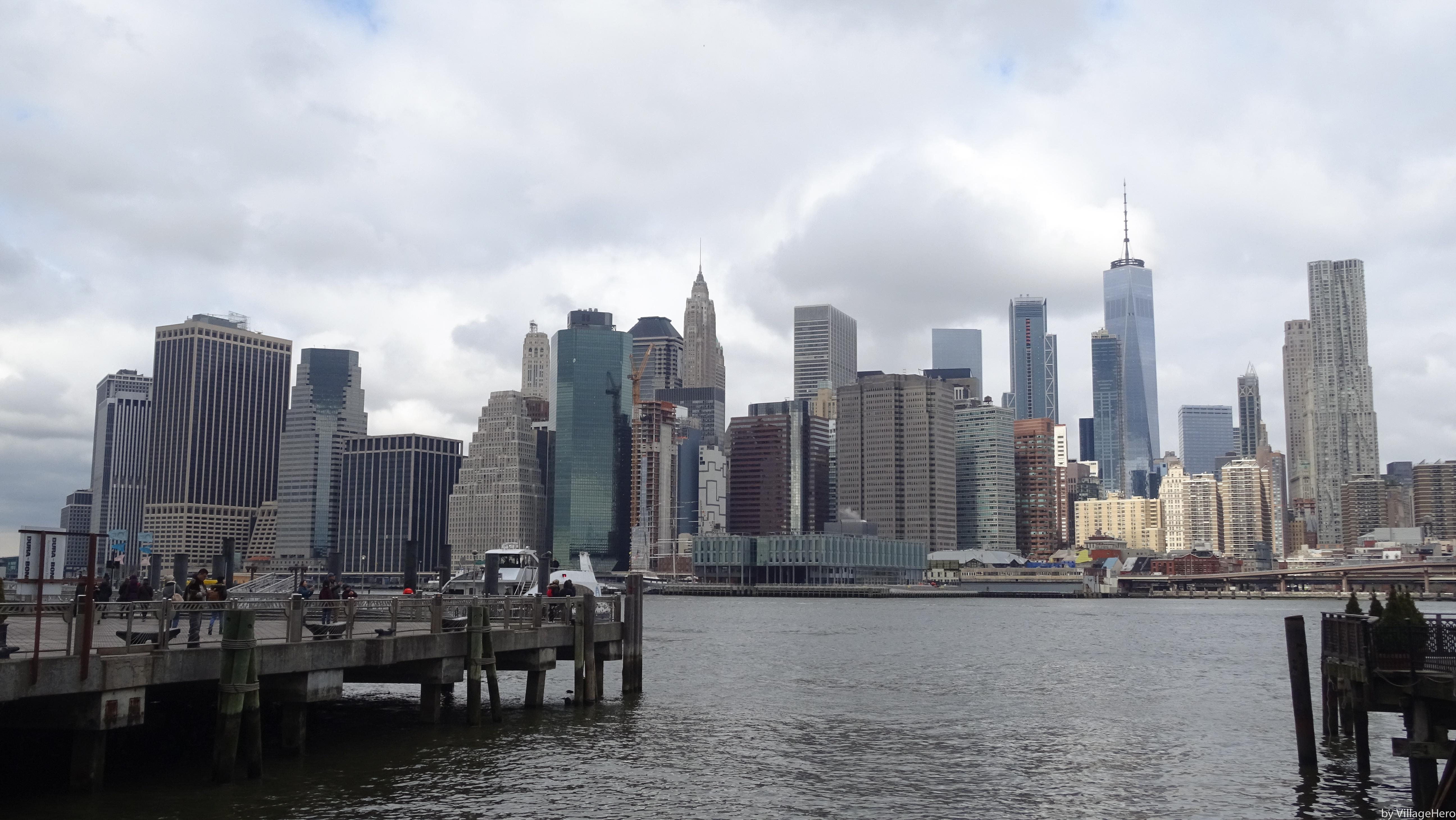 by